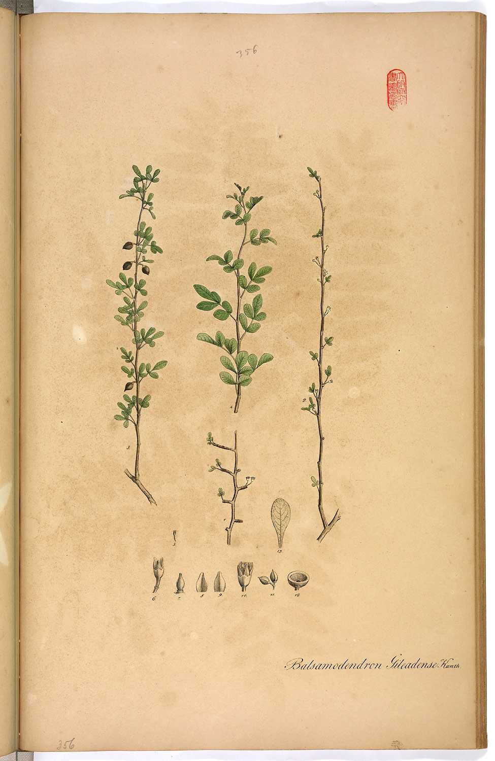 Planche 356 représentant le Commiphora opobalsamum